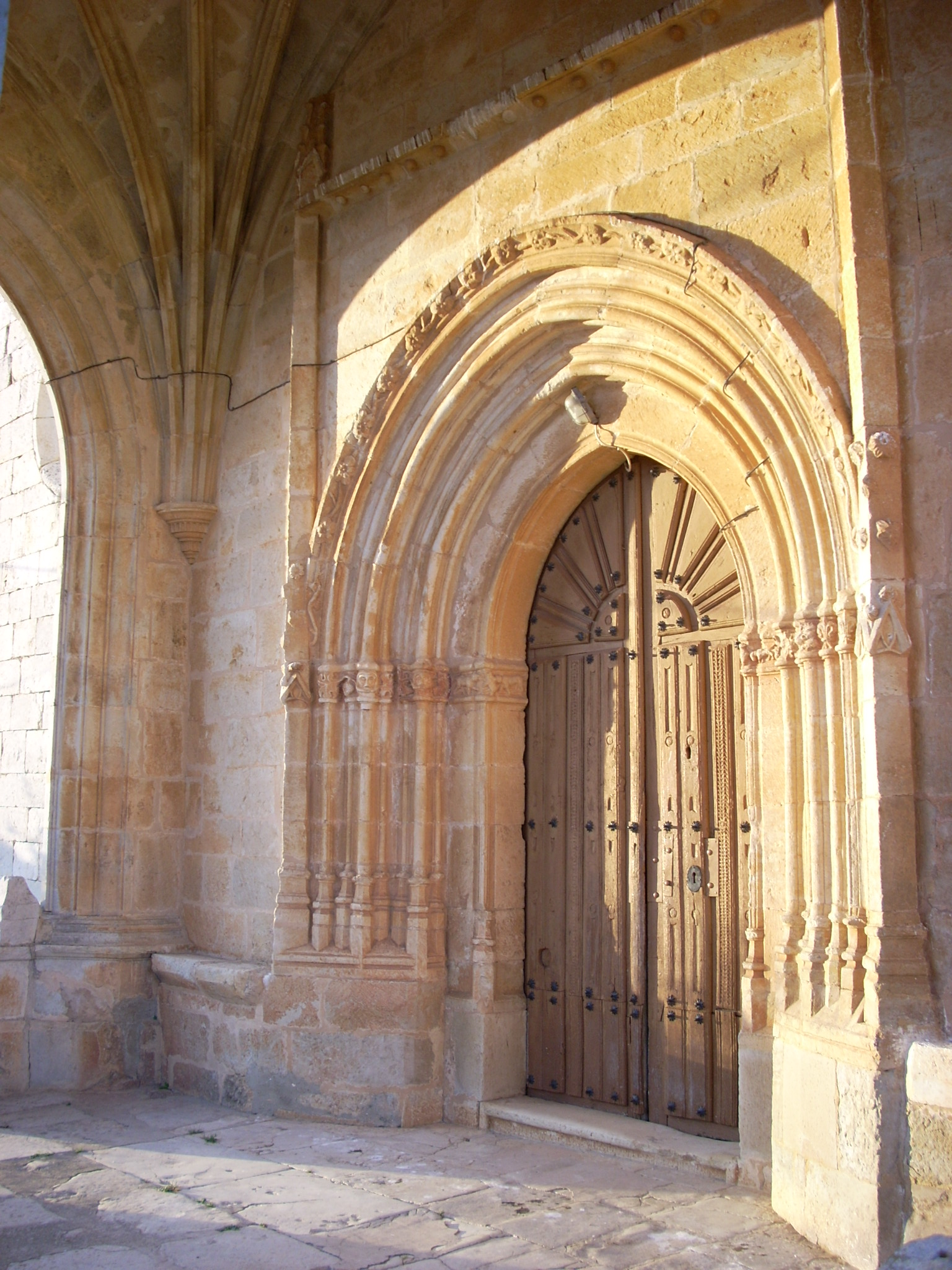 Puerta gótica de la iglesia de S. Fructuoso, Colmenares (Palencia).